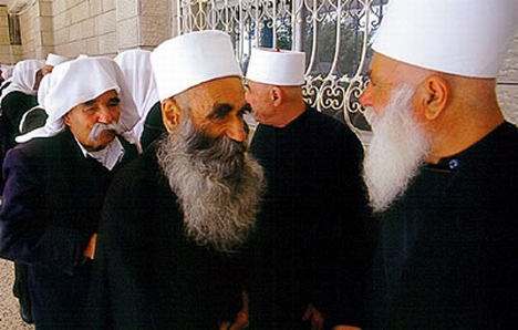 مشايخ الدروز ( العقـّـال ) باللفة البيضاء واللباس الأسود